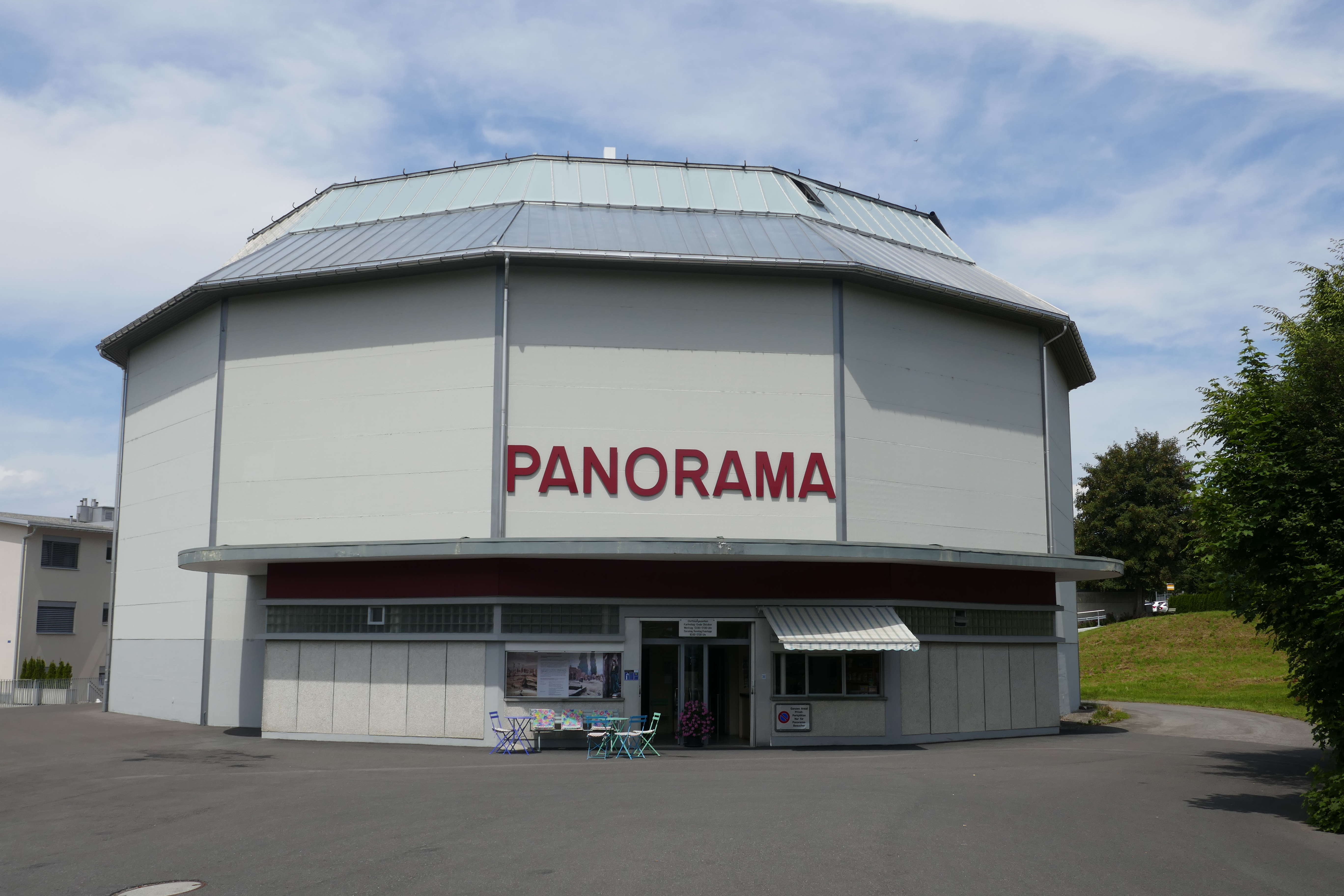 Das Panorama-Gebäude mit dem Rundgemälde "Kreuzigung Christi" in Einsiedeln